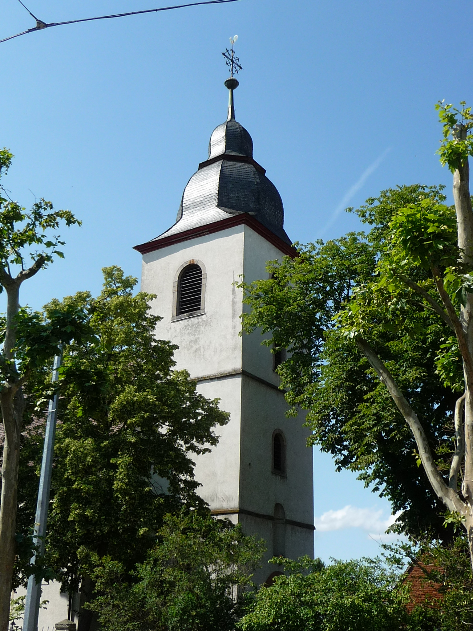 Queichheim ist ein Stadtteil von Landau in der Pfalz in Rheinland-Pfalz.